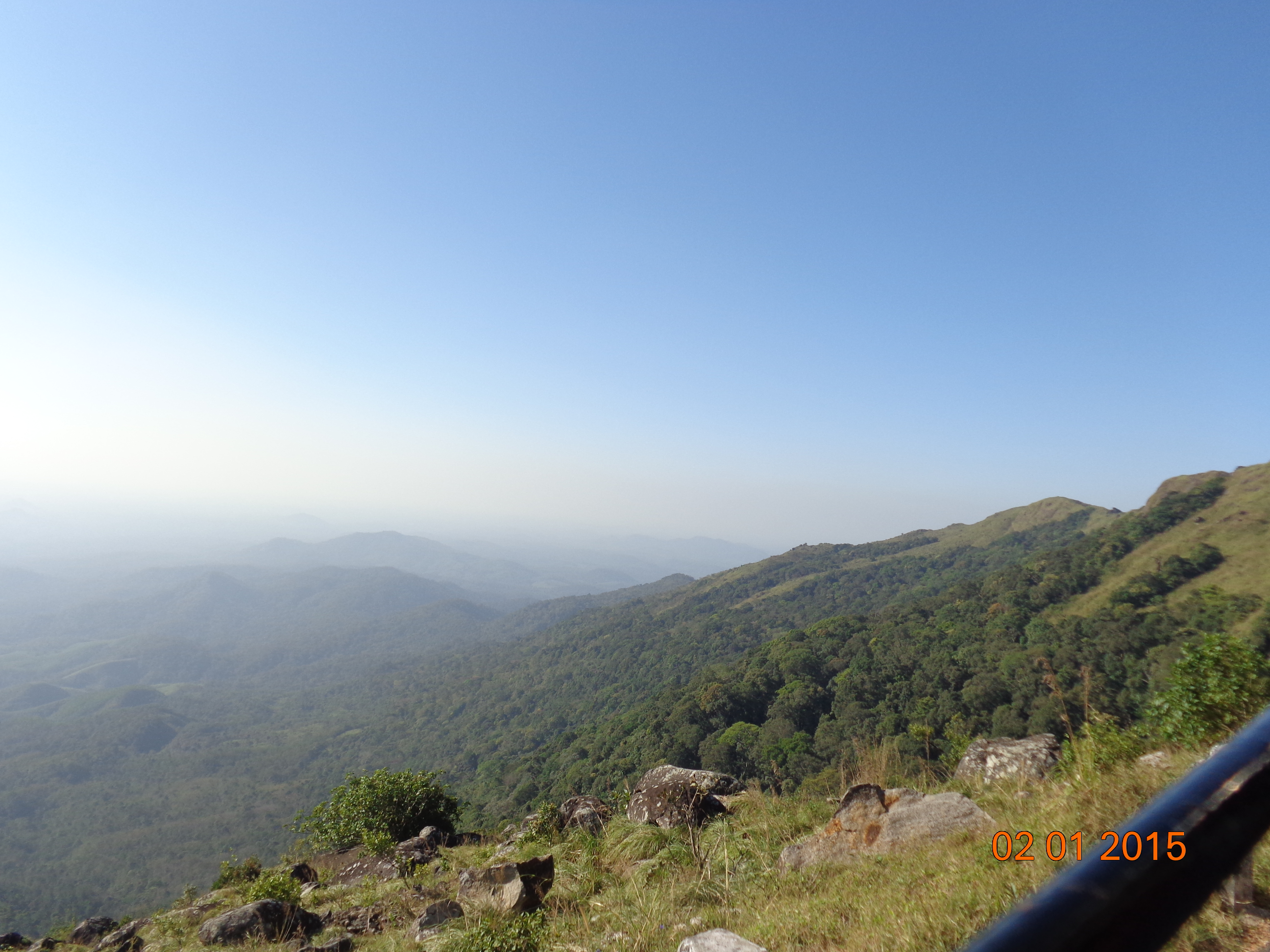 ponmudi hills, thiruvananthapuram kerala